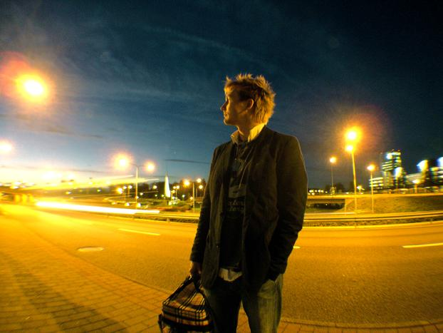 DJ Slow